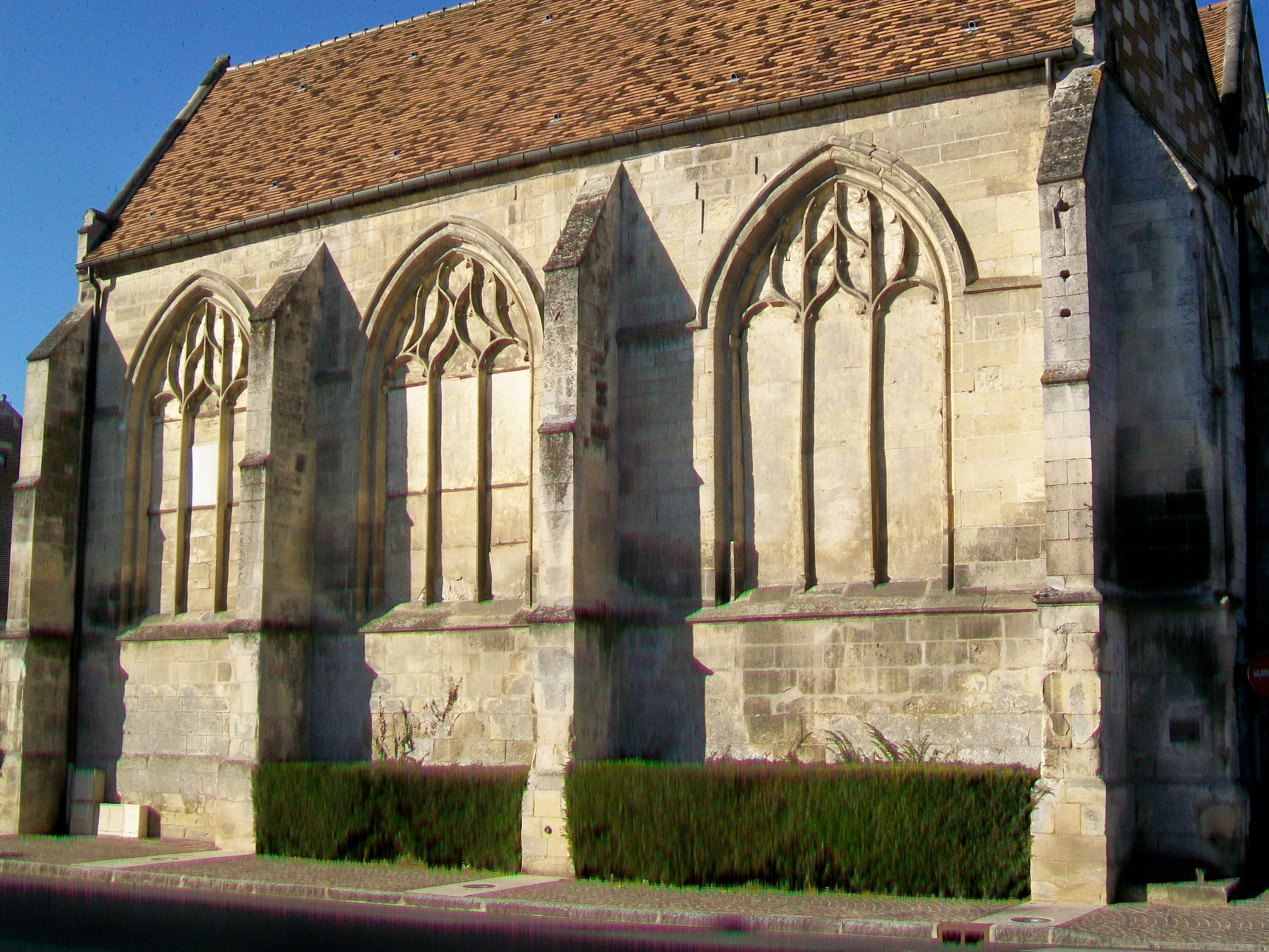 Le chevet (façade nord-est) sur la RD 13. Les trois baies sont bouchées.